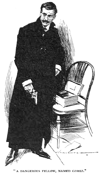 Arthur Conan Doyle, The Lost Special (1898), Illustration by Max Cowper, in The Strand Magazine "A dangerous fellow, named Gomez." Артър Конан Дойл, Изчезналия превоз (1898), Илюстрация от Макс Купър, в списание „Странд”